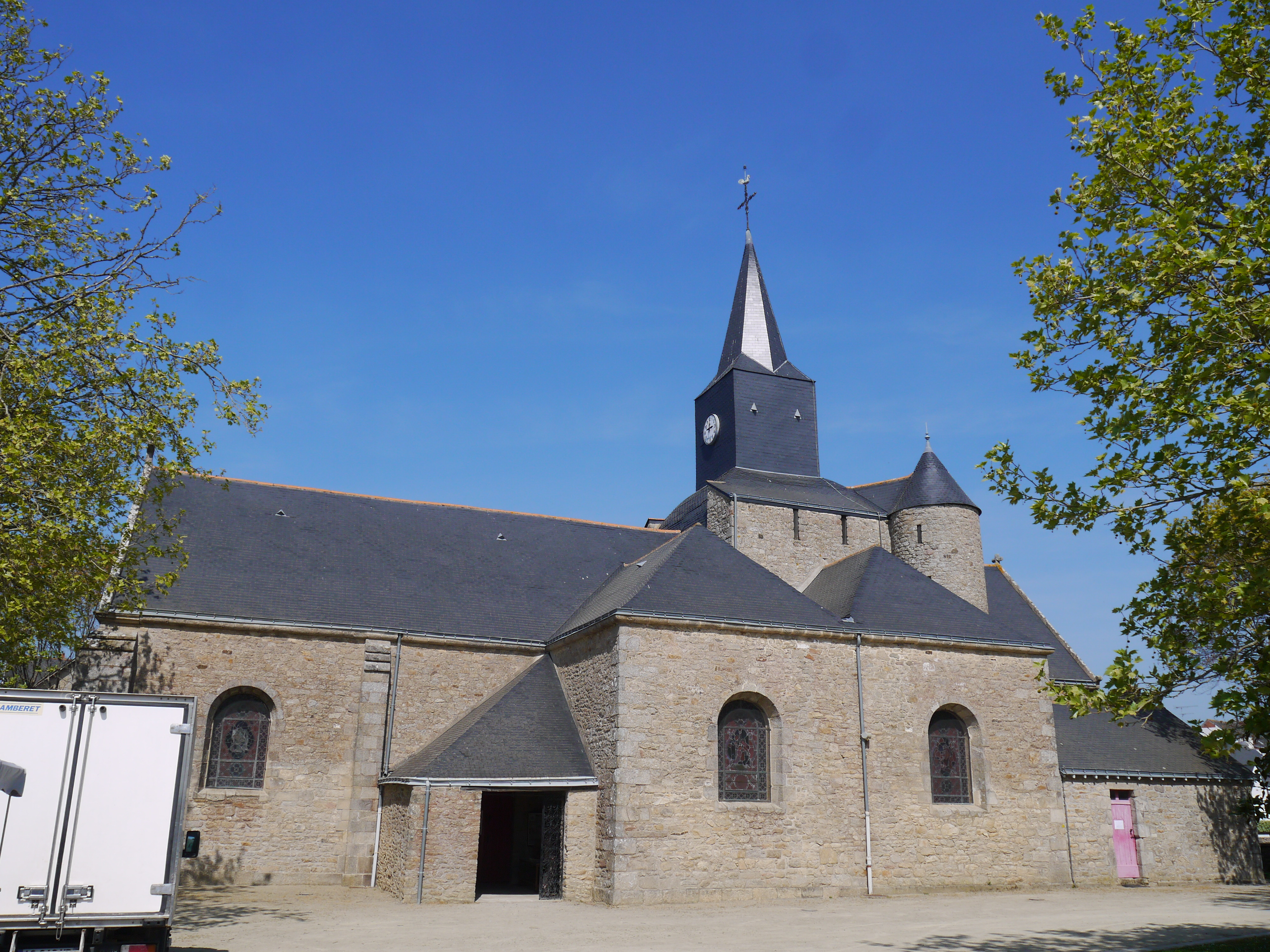 L'église Saint-Pierre.